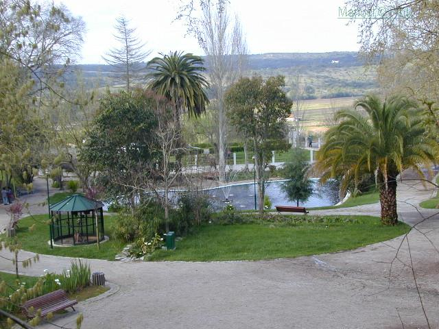 Jardim Público